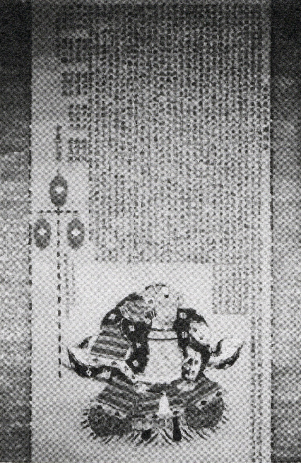 米倉丹後守重継の肖像(モノクロ)。